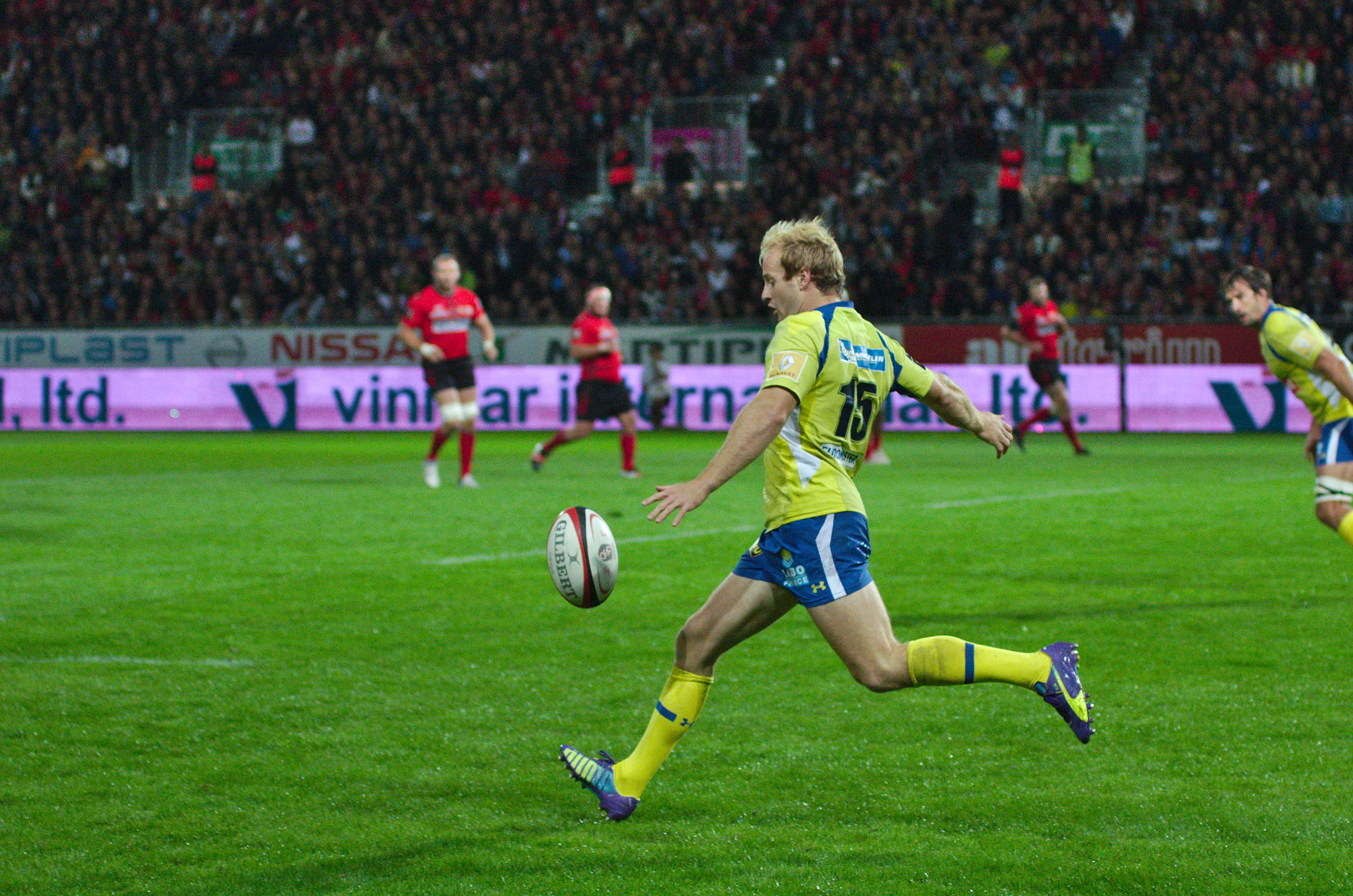 USO-ASM - 20140927 - Dégagement au pied de Nick Abendanon